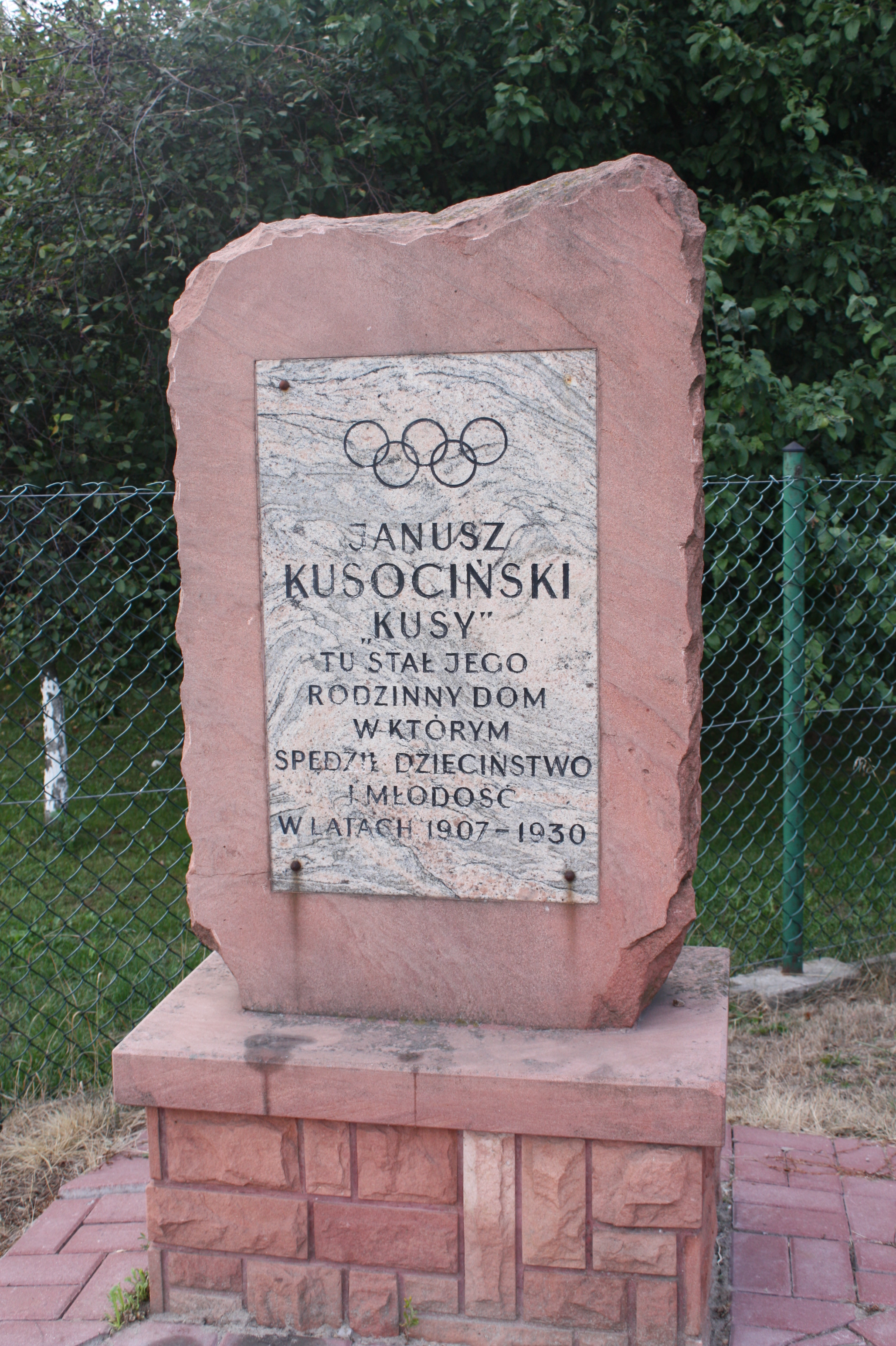 Tablica upamiętniająca Janusza Kusocińskiego w Ołtarzewie na ul. Kościuszki